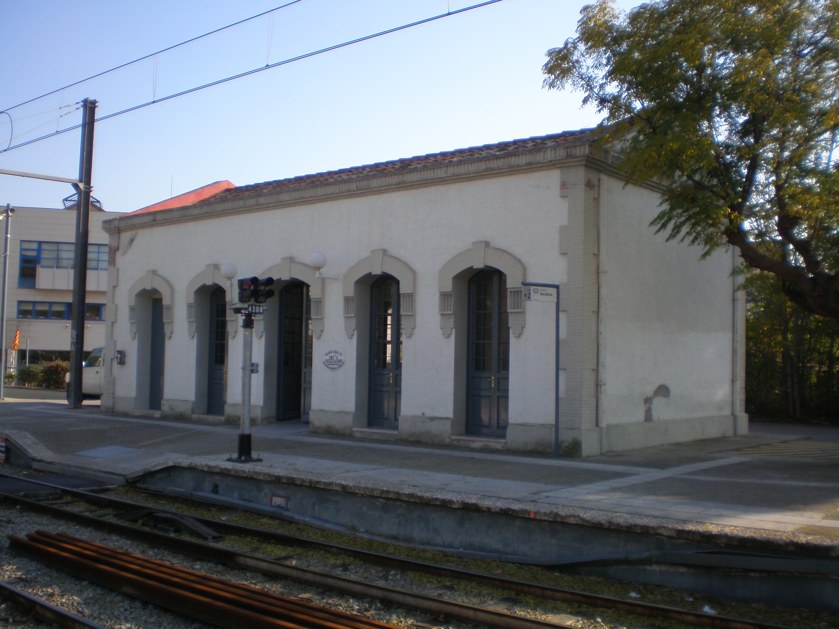 Edifici de viatgers de Vallbona d'Anoia (R6)